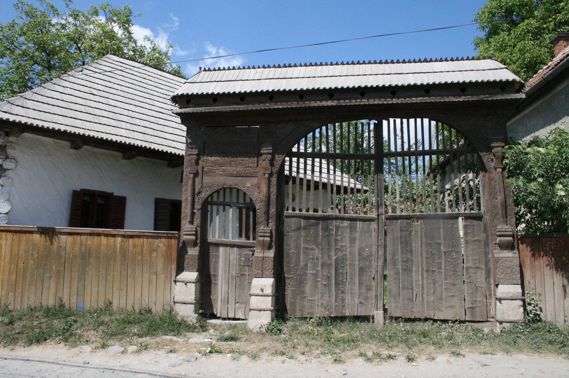 Poarta secuiasca din sec. XIX.